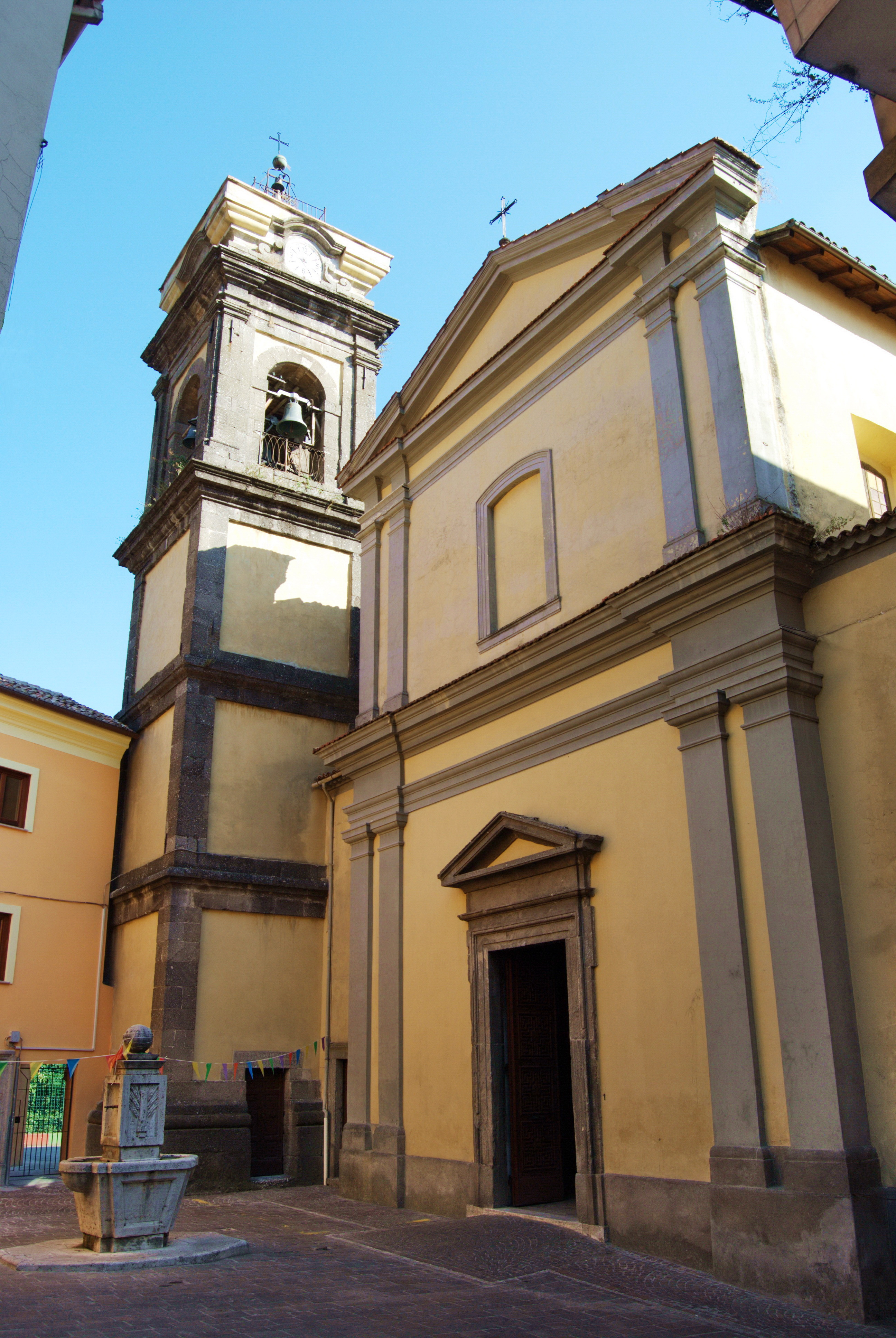 Facciata della Chiesa di Santa Maria Maggiore a Supino (FR), Italia